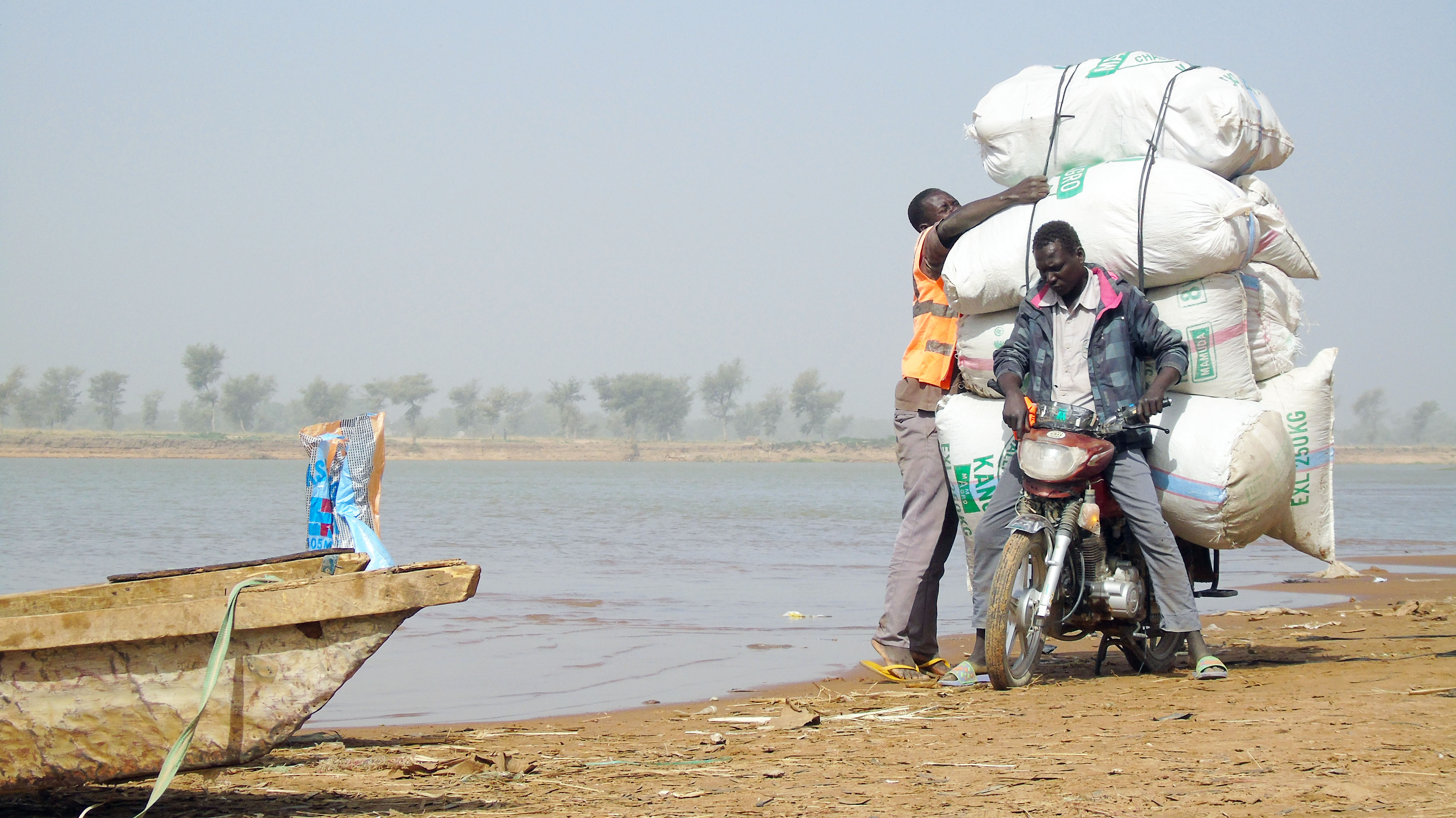 Photo d'un taxi-clando qui transporte des marchandises sur la rive du fleuve Logone This is an image with the theme "Africa on the Move or Transport" from: Chad